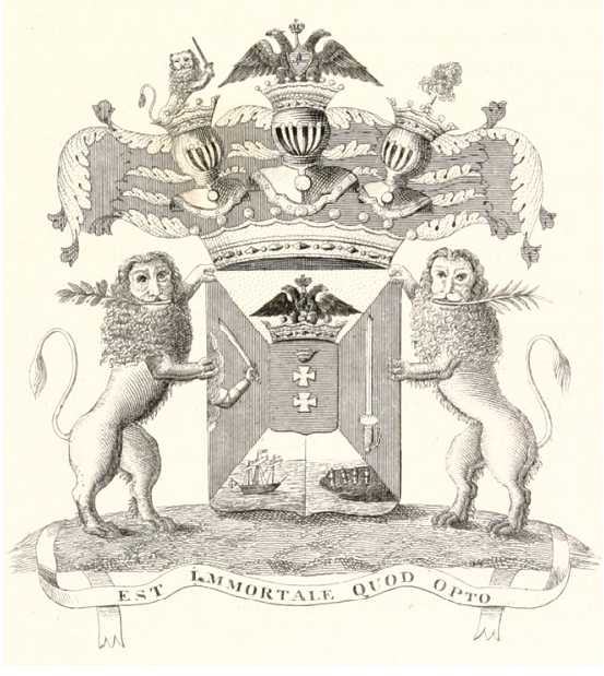 Герб графа Коновницына